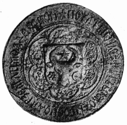 Pecetea lui Alexandru Lăpușneanu 1552-1561